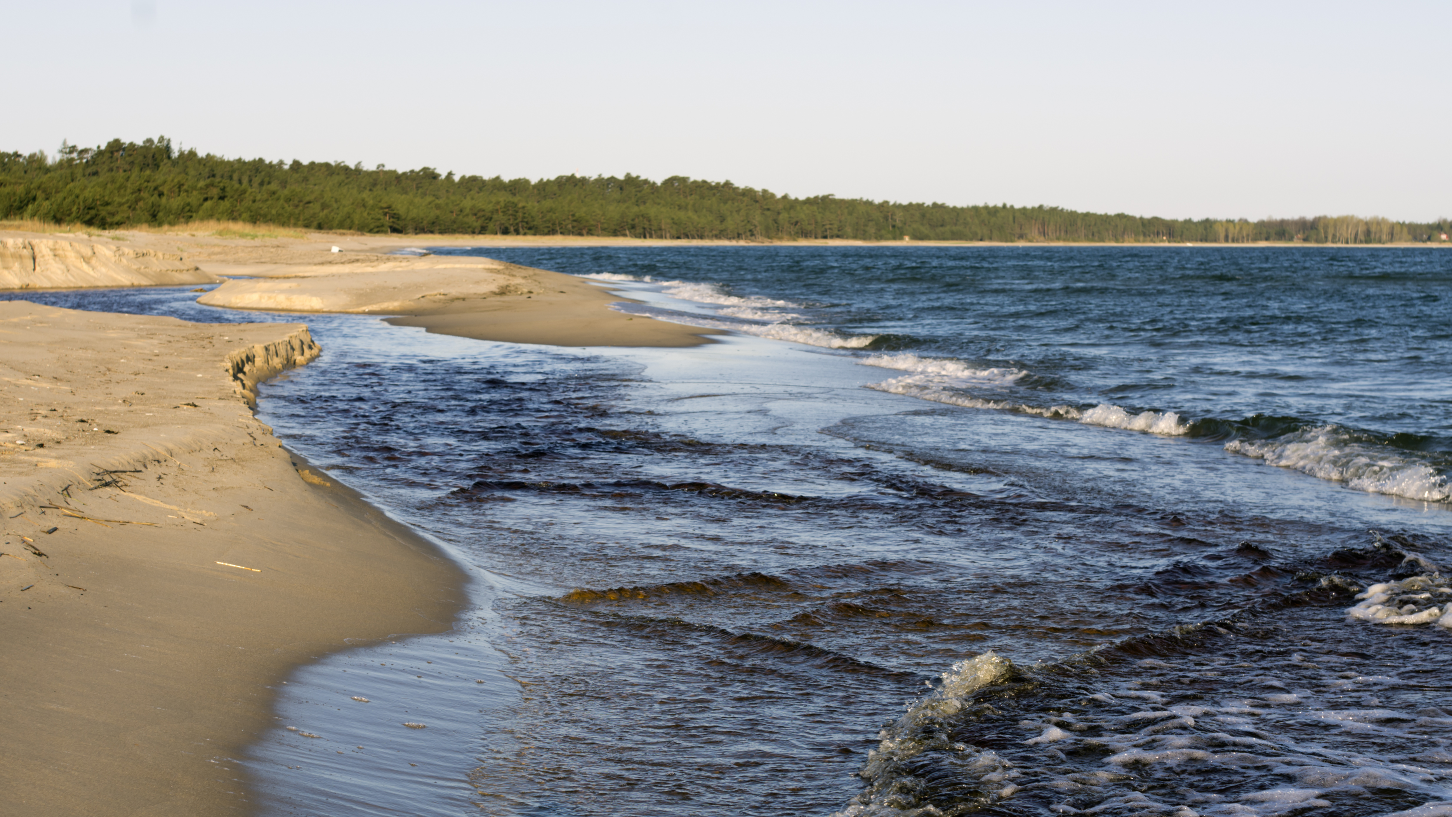 Uuejõe suue Nõva-Osmussaare hoiualal 2015. mais